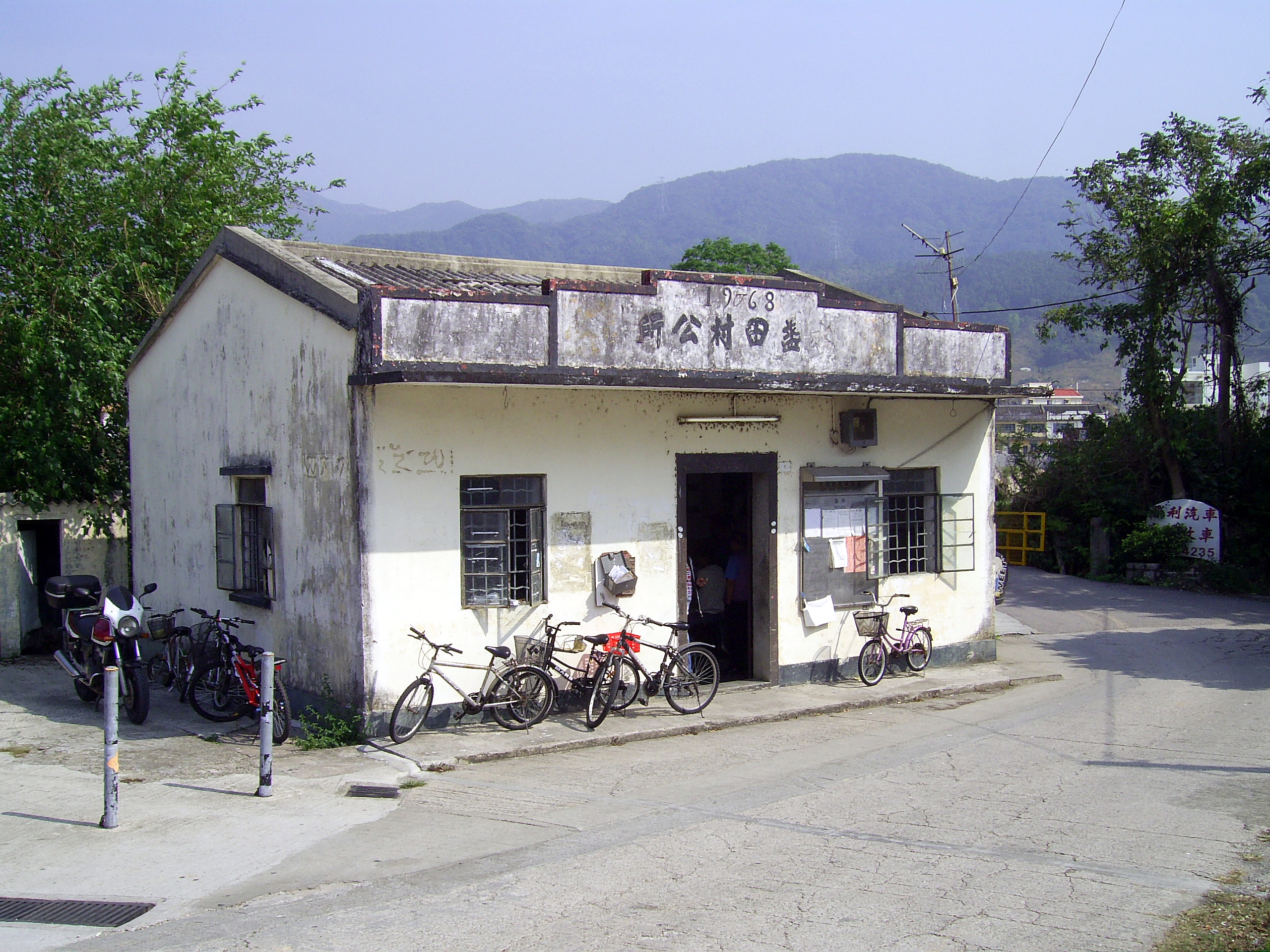 中文（香港）: 水盞田村公所